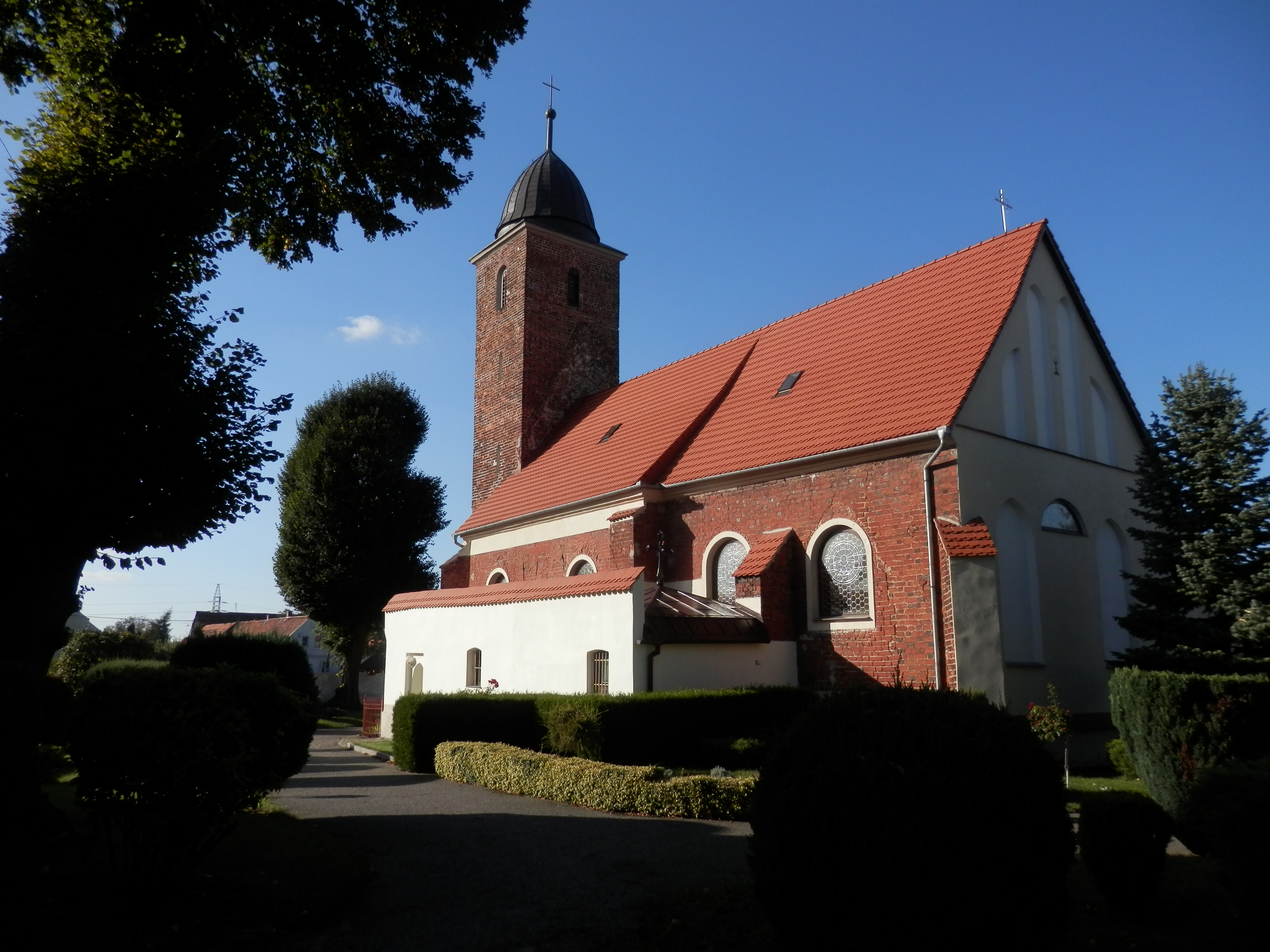 Glogow, Poland